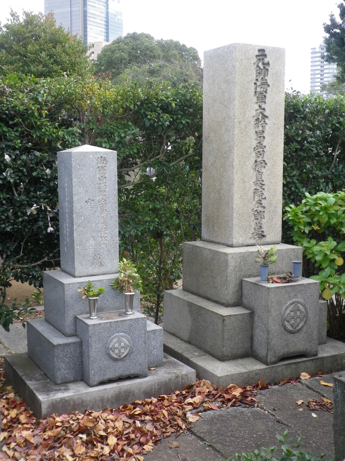 伊集院五郎・伊集院松治の墓